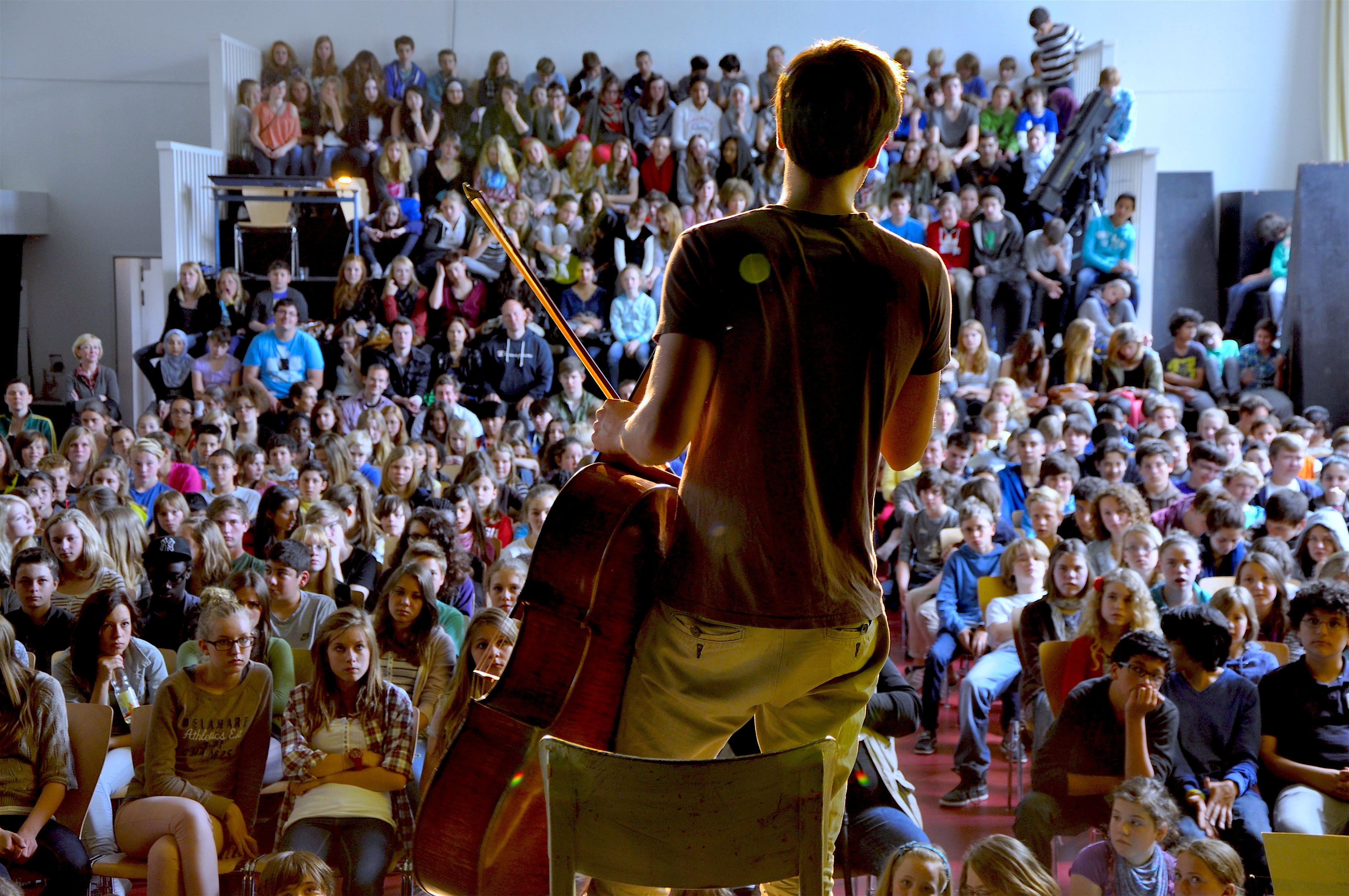 Wassily Gerassimez im Schulkonzert im Rahmen des TONALi Wettbewerbs